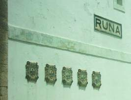 Estação ferroviária de Runa. Prémios de jardinagem.